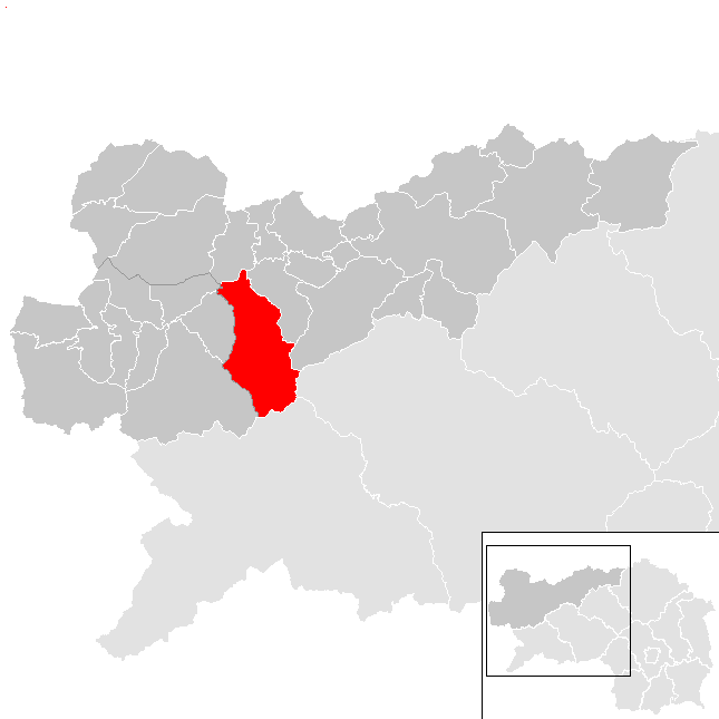 Lage von Irdning-Donnersbachtal im Bezirk Liezen